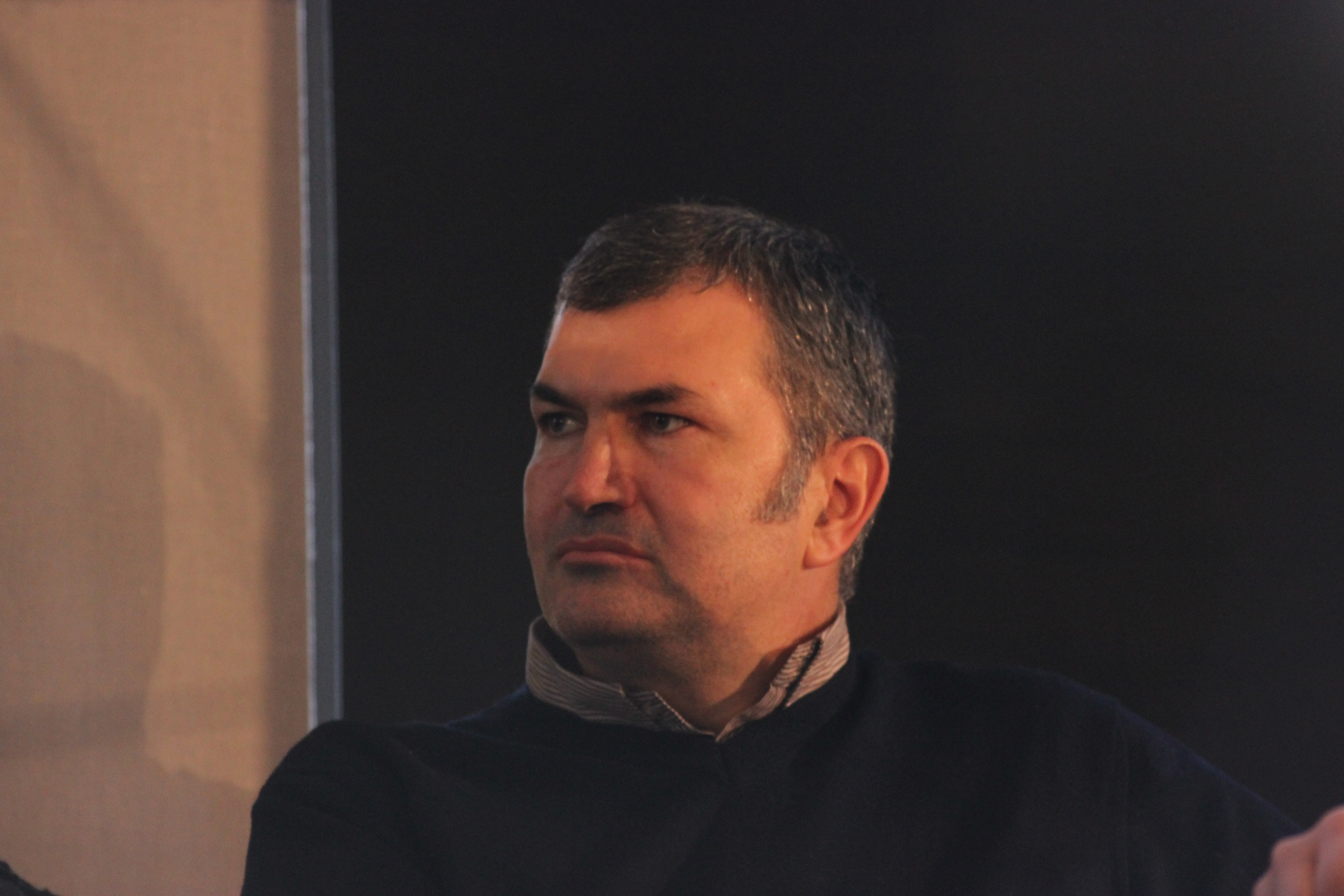 Kiril Vasilev at SOFIA INTERNATIONAL LITERARY FESTIVAL 2015